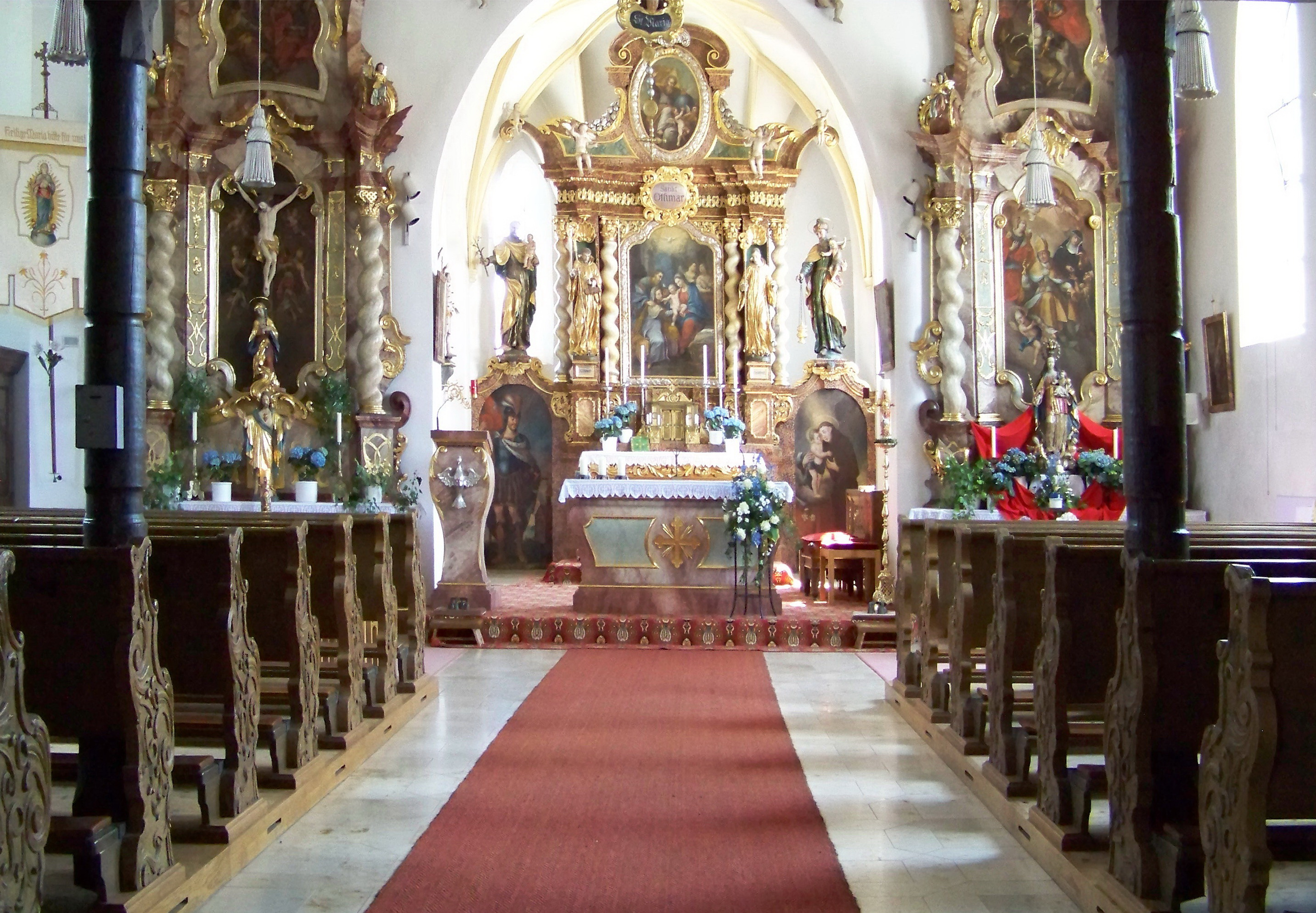 Altdorf bei Landshut. Pfettrach, Pfeffenhausener Straße 21. Katholische Filialkirche St. Othmar, Tor und Seelenhaus. Saalkirche mit eingezogenem Chor, um 1500. Barockisiert. Gliederung durch Strebepfeiler am Langhaus. Chorbogen spitz gefast.